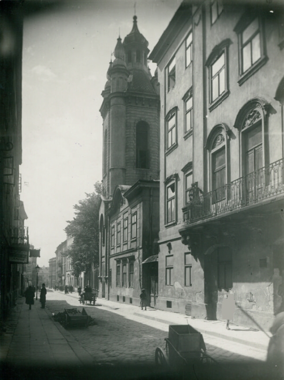 Ulica Ormiańska we Lwowie [ca 1925] Münz, Marek (1872-1937) 1 fot. : odb. na pap. srebrowo-żelatynowym ; 15,1x11,1 cm